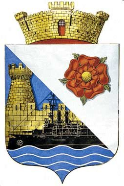 Hortens byvåpen fra 1907